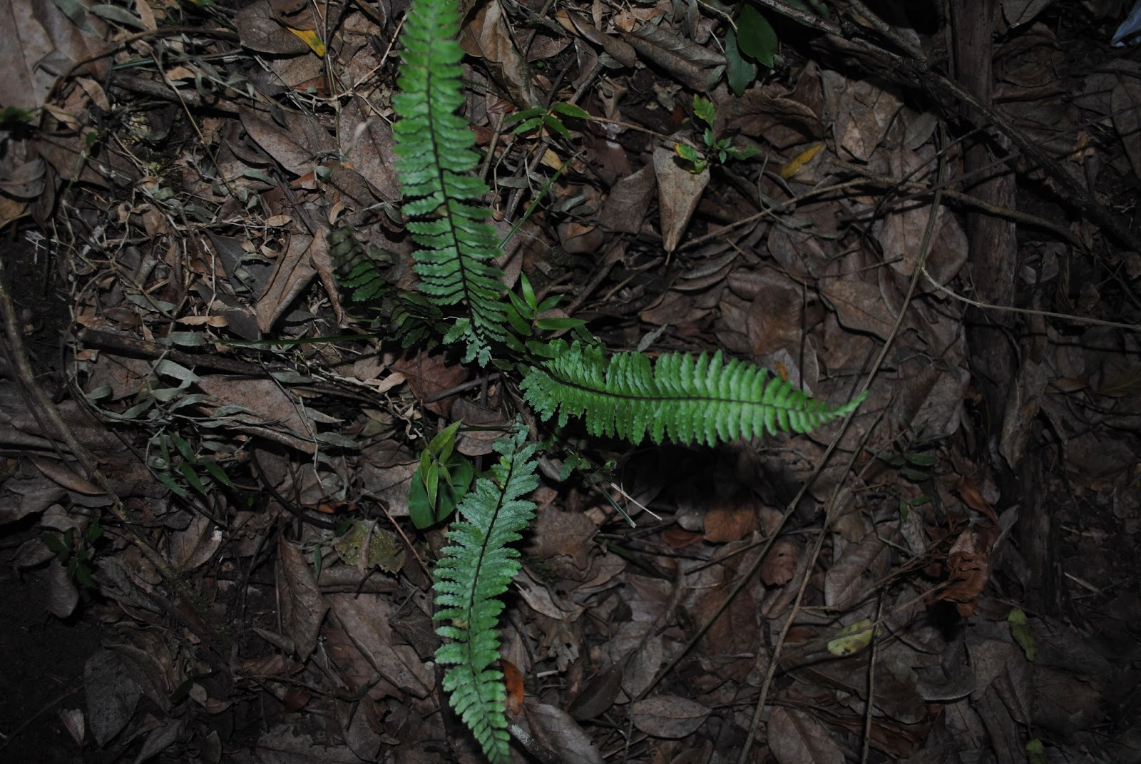 Asplenium sellowianum. Aspleniaceae. Fotos tomadas bajo bosque ribereño al margen del Arroyo David Ciego en Bajada de Pena, departamento de Rivera, Uruguay.